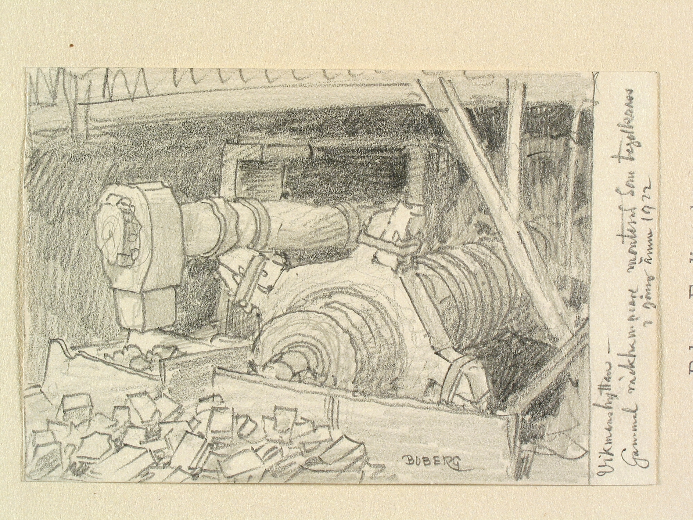 Dalarna, Hedemora sn., Vikmanshyttan. "Gammal räckhammare monterad som tegelkross. I gång ännu 1922". Teckning av Ferdinand Boberg Depicted place: Hedemora sn., Vikmanshyttan (Ortnamn därutöver), Dalarna County (Q103732)